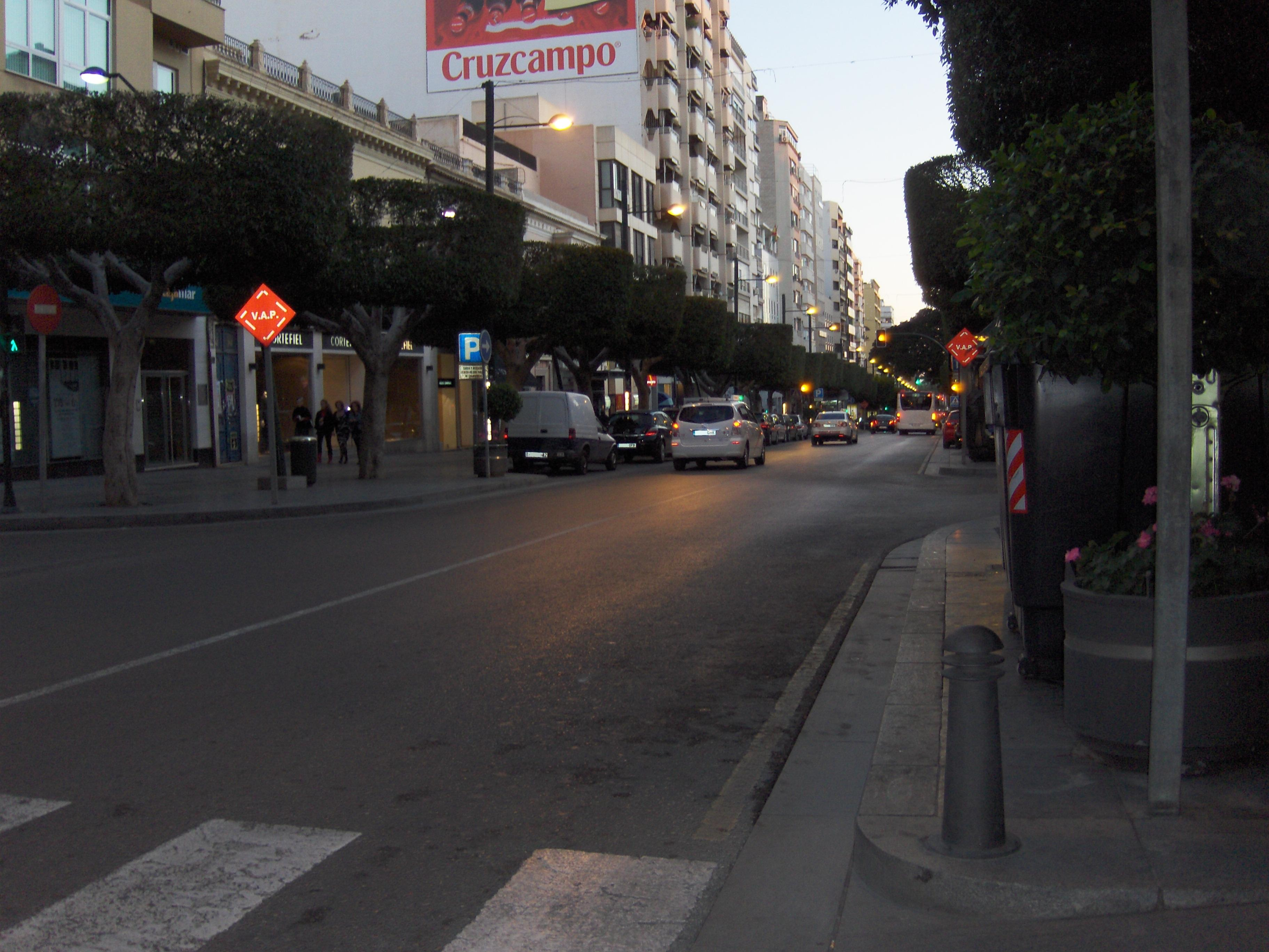 Paseo de Almería